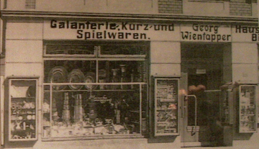 Der Galanterie-, Kurz- und Spielwaren-Laden Wientapper in Uetersen um 1901